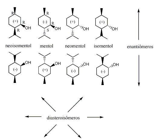 enantiomeros mentol